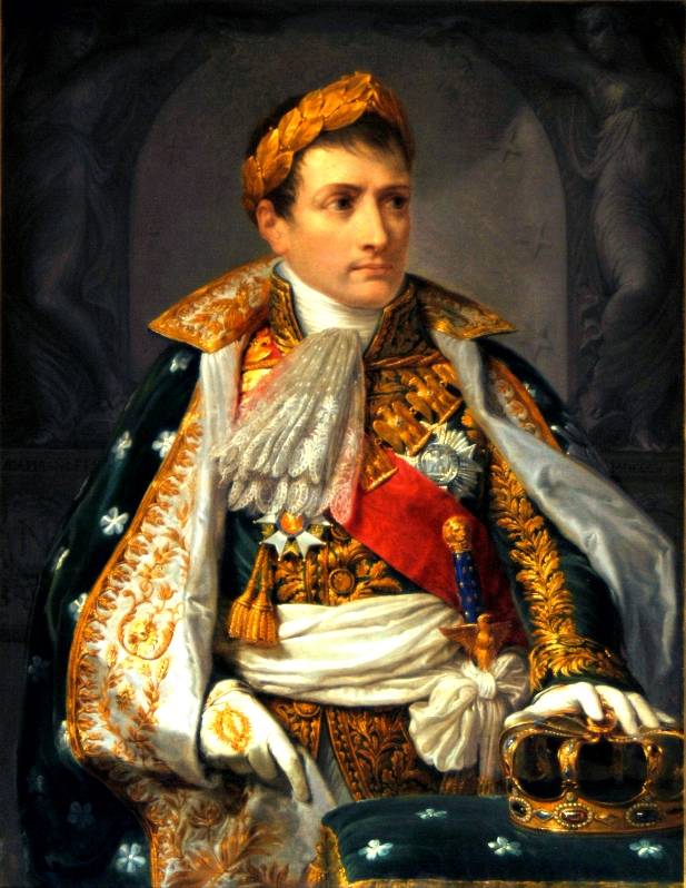 Portrait Napoleon Bonaparte als König von Rom